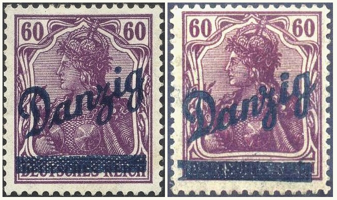 Echte Aufdruckmarke (links) im Vergleich zur Marke mit gefälschtem Aufdruck der Mi. Nr. Danzig 47